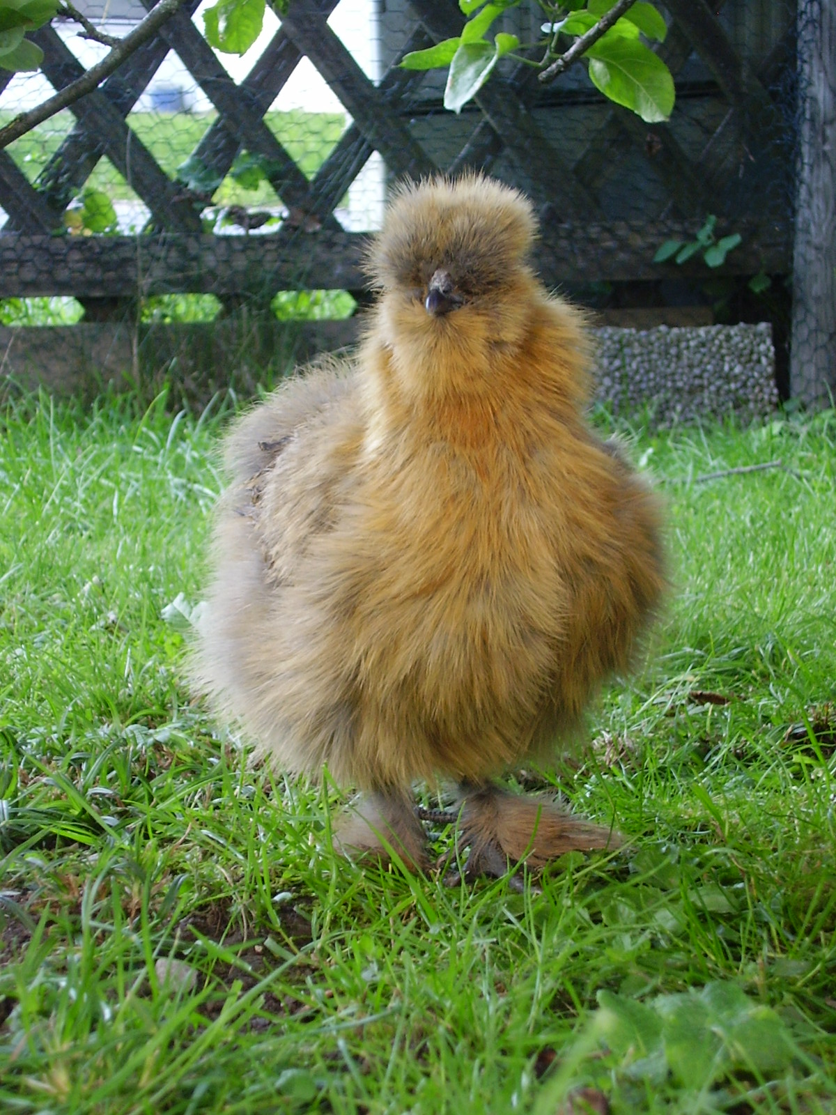 A Partridge Silkie hen